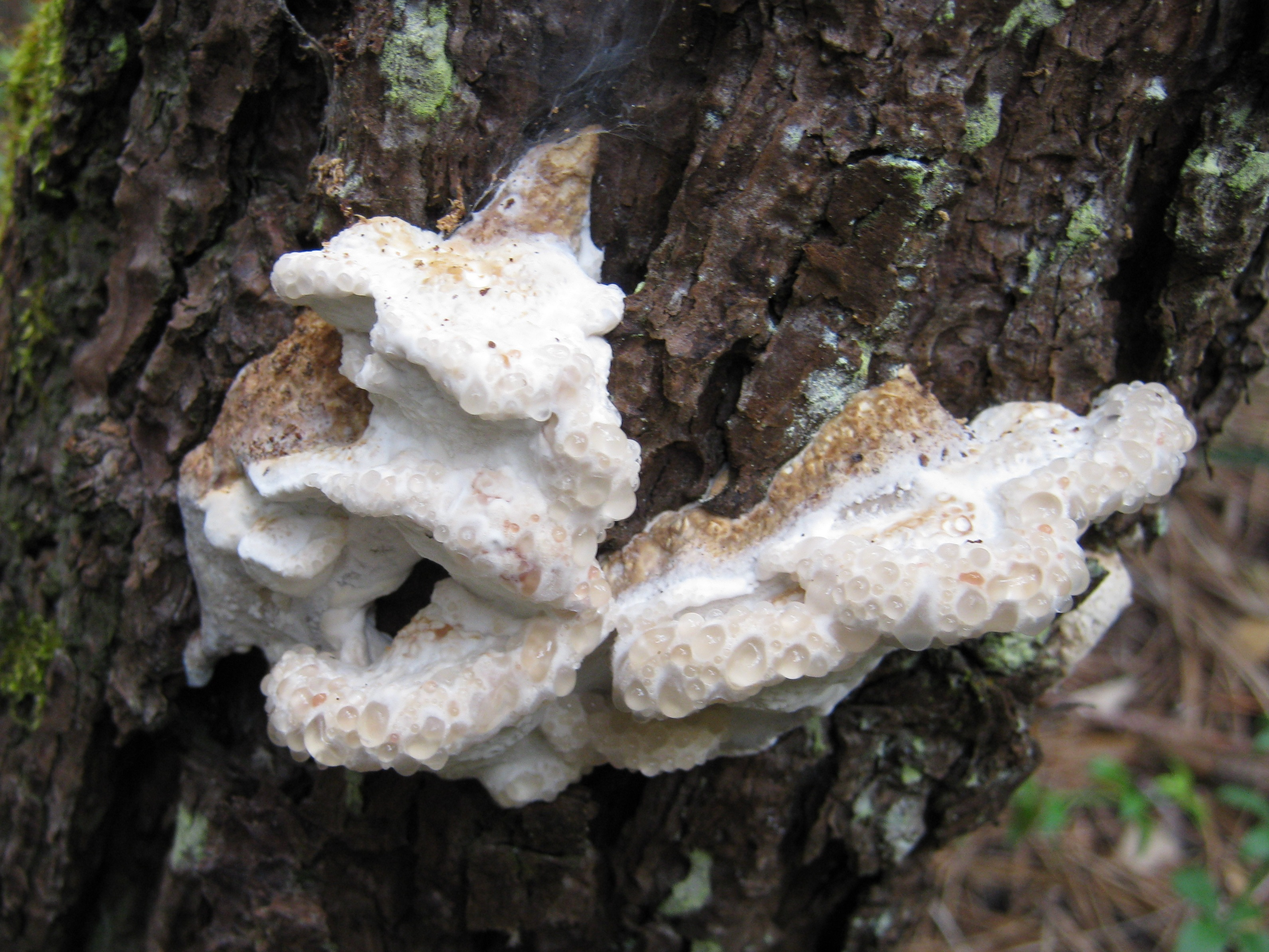 Oligoporus guttulatus